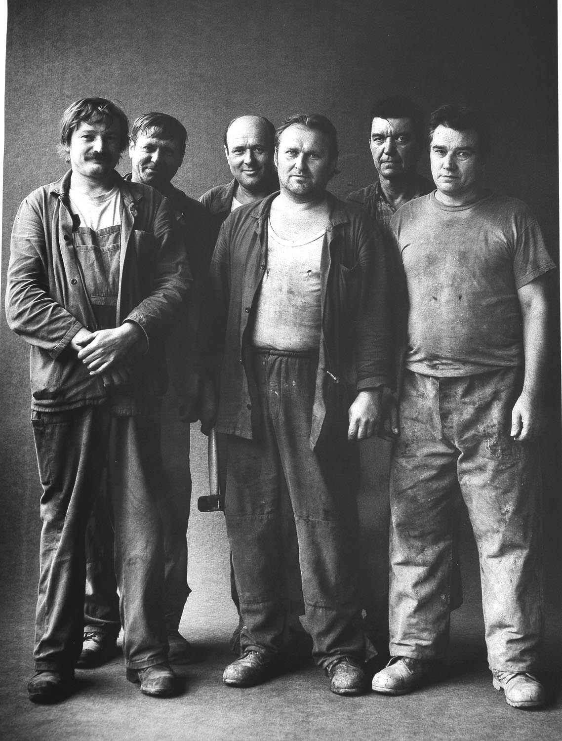 Photograph from Český člověk´s archive. Snímek z cyklu Český člověk.